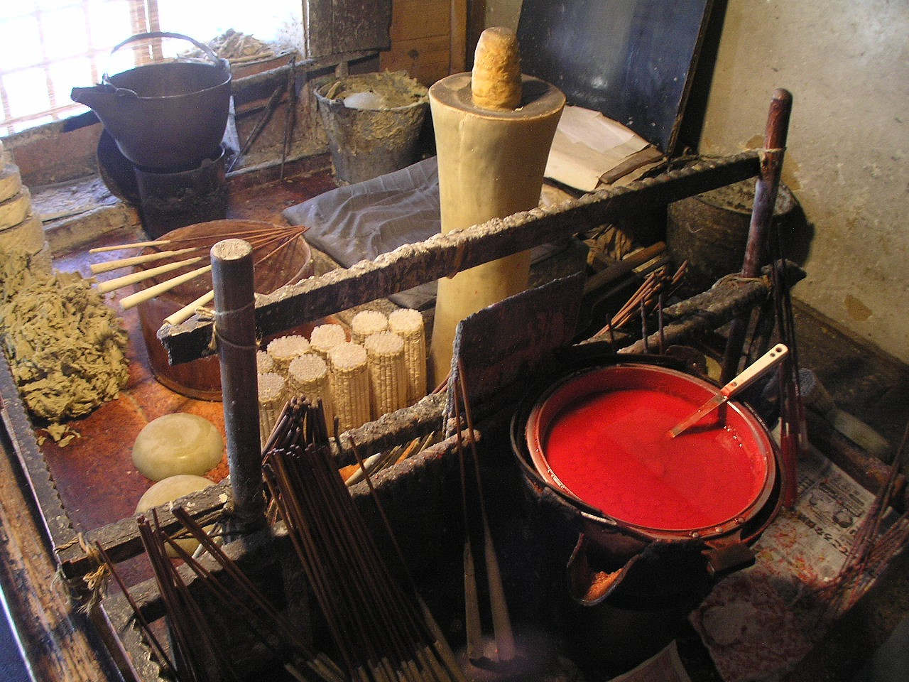 和蝋燭 三嶋屋・飛騨古川